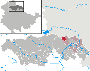 Ichstedt in Thuringia - Kyffhäuserkreis